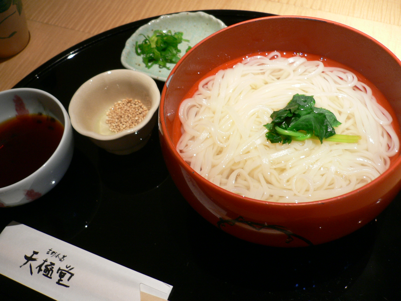 手延べ葛うどん (奈良市押上町1-6、近鉄奈良駅最寄りの葛料理・葛菓子の葛専門店「吉野本葛 天極堂」[1]本店)